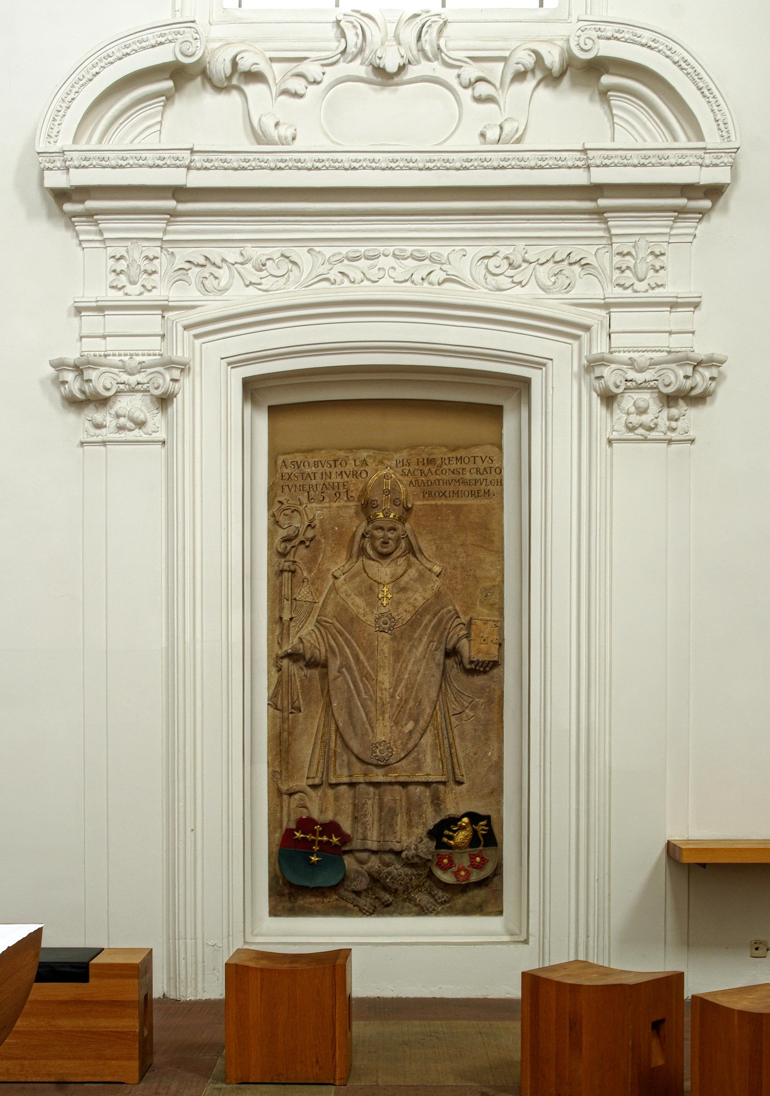 Epitaph Johannes Kerer in der Jesuitenkirche in Freiburg auch Unikirche genannt